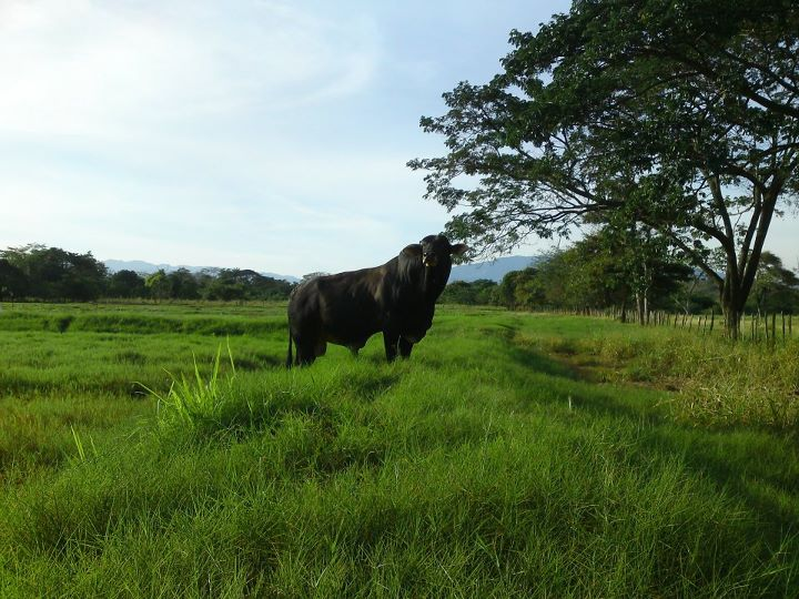 economia